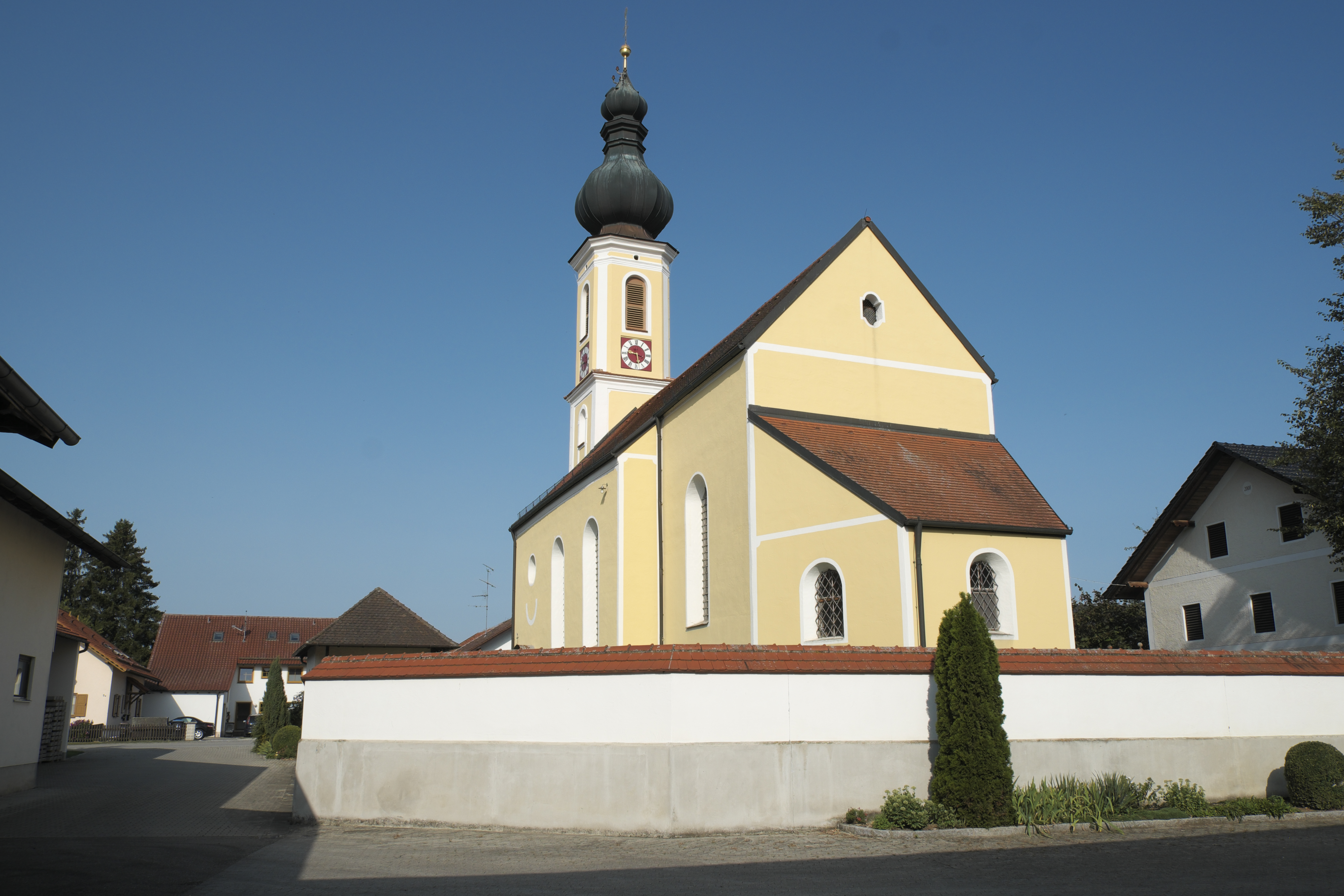 Katholische Filialkirche St. Vitus in Grucking (Fraunberg) im Landkreis Erding (Bayern/Deutschland)